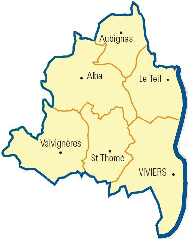 Carte détaillée des communes du canton (Ardèche)